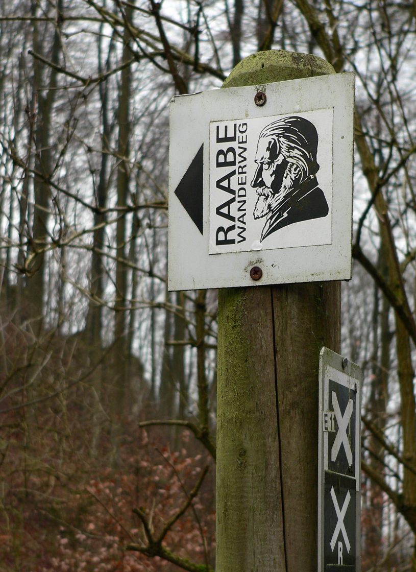 Schild des Raabe Wanderwegs bei Holzen